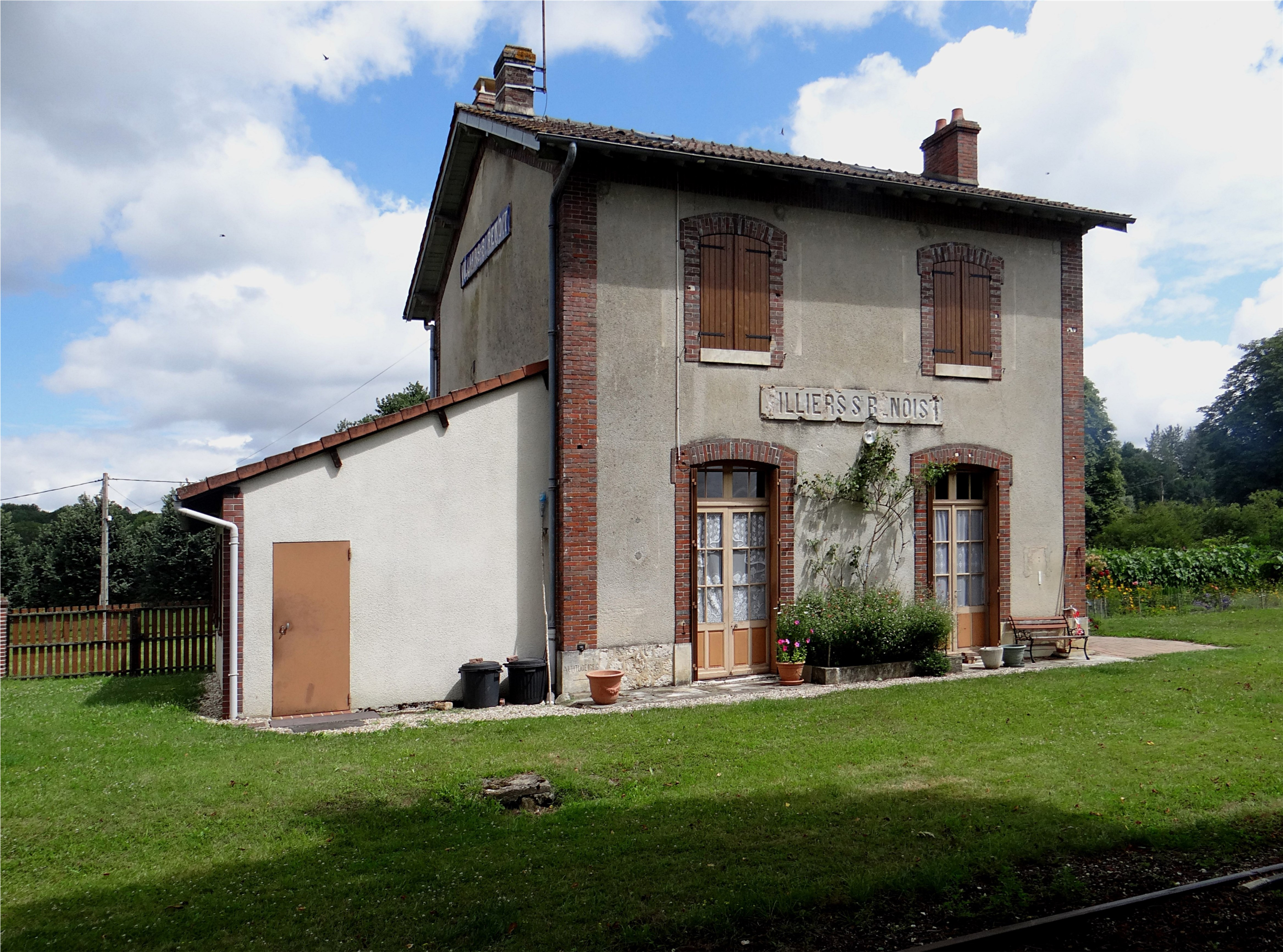 Gare de Villiers-Saint-Benoît, Yonne, France.